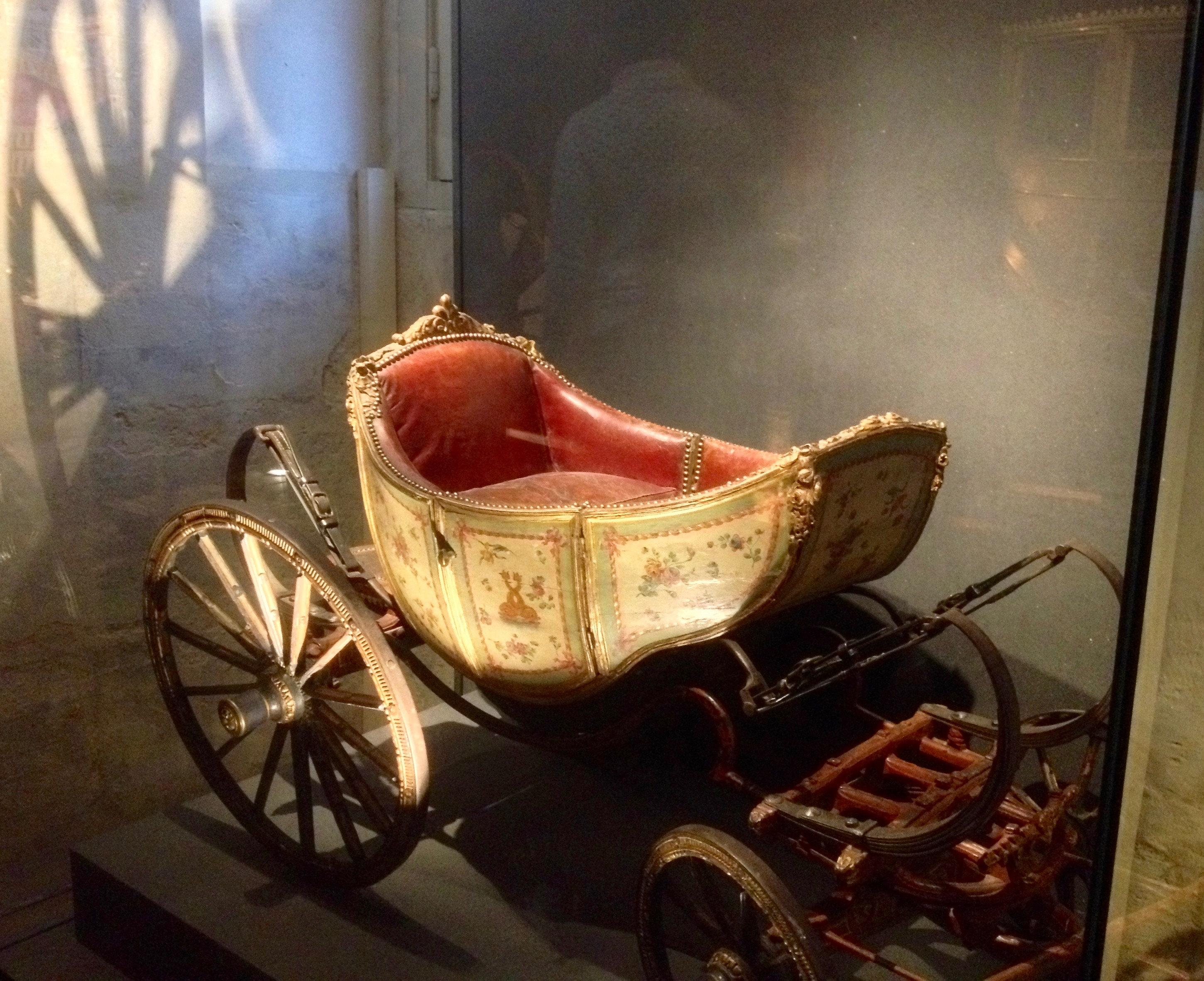 Anonyme: Petite calèche du Dauphin Louis Charles de France, futur Louis XVII, vers 1785-1789, bois sculpté, peint et doré, bronze ciselé et doré, fer peint et doré, garniture en cuir rouge, exposée à la Galerie des Carrosses, Grande Ecurie du château de Versailles, Versailles, France.